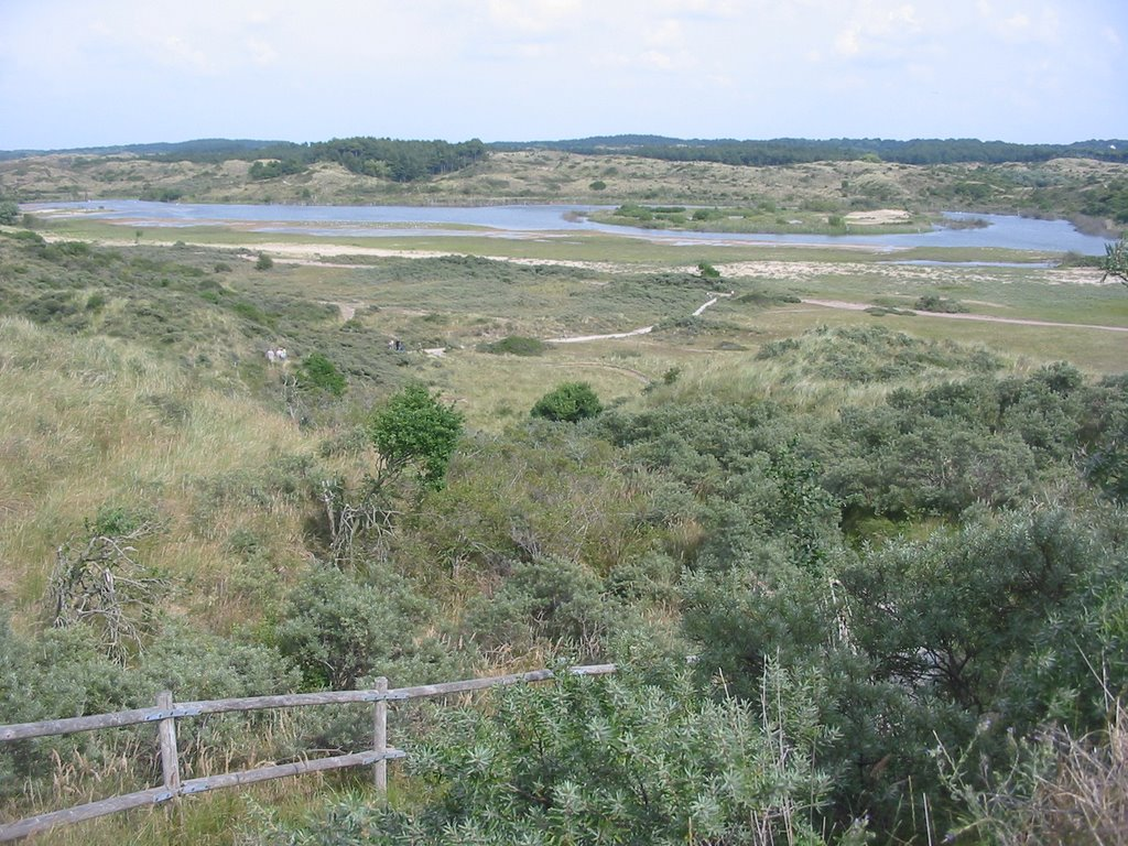 Duinen in Nationaal Park Zuid-Kennemerland